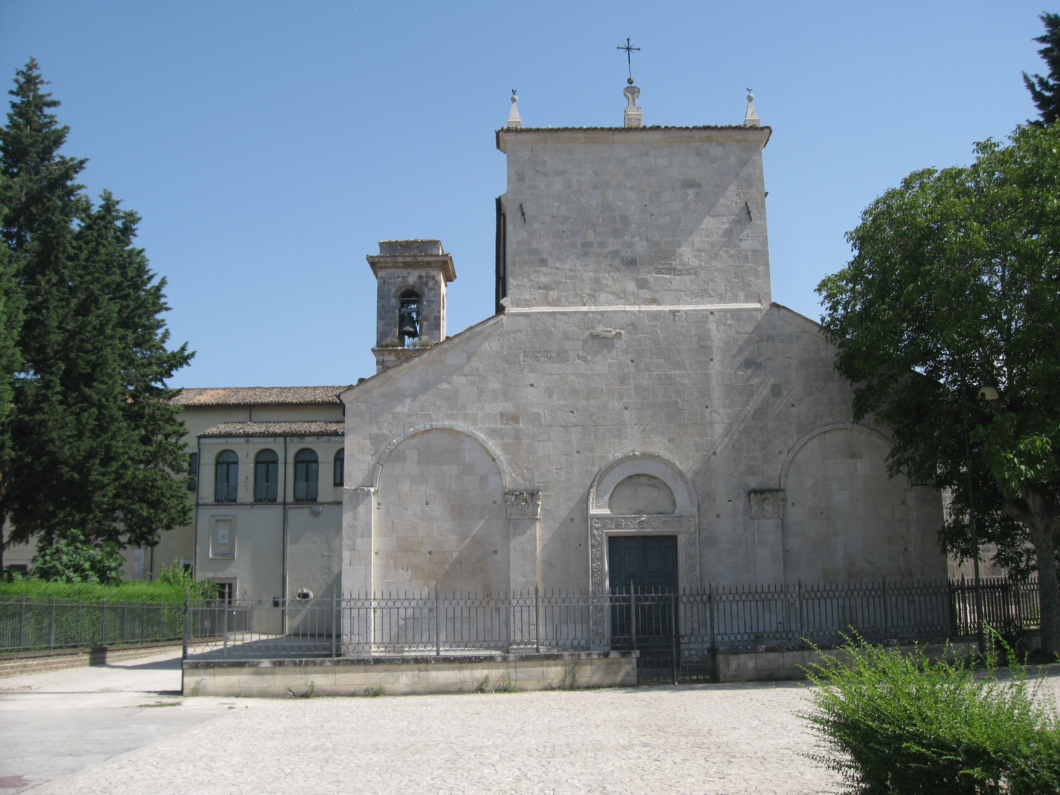 Abbazia di San Pelino